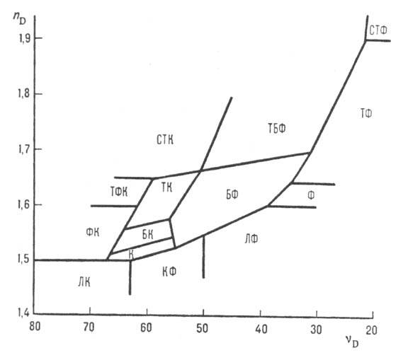 Классификация оптических стёкол (диаграмма Аббе) в зависимости от их показателя преломления (nD) и коэф. дисперсии света (vD): ЛК-легкие кроны; ФК-фосфатные кроны; ТФК-тяжелые фосфатные кроны; К-кроны; БК-баритовые кроны; ТК - тяжелые кроны; КФ - кронфлинты: БФ-баритовые флинты; ТБФ-тяжелые баритовые флинты; ЛФ-легкие флинты; Ф-флинты; ТФ-тяжелые флинты; СТФ-сверхтяжелые флинты; СТК-сверхтяжелые кроны.